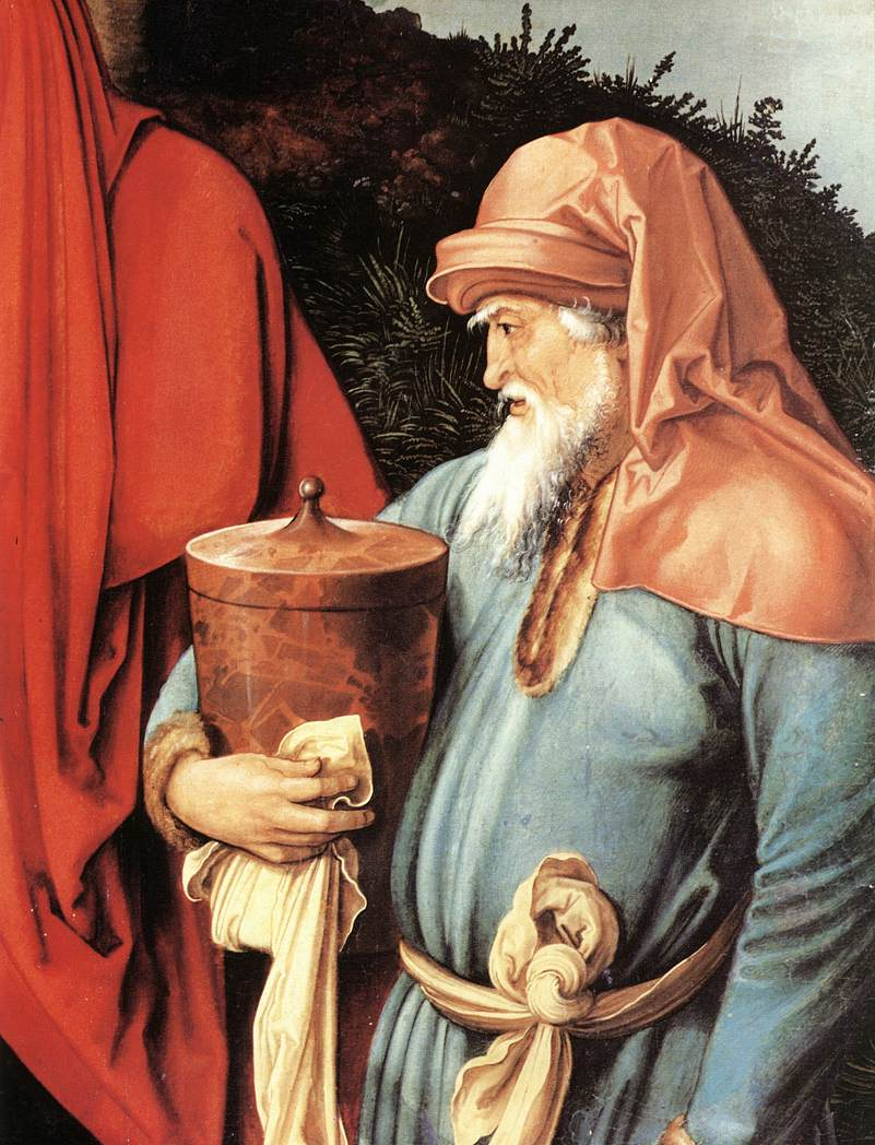 detail